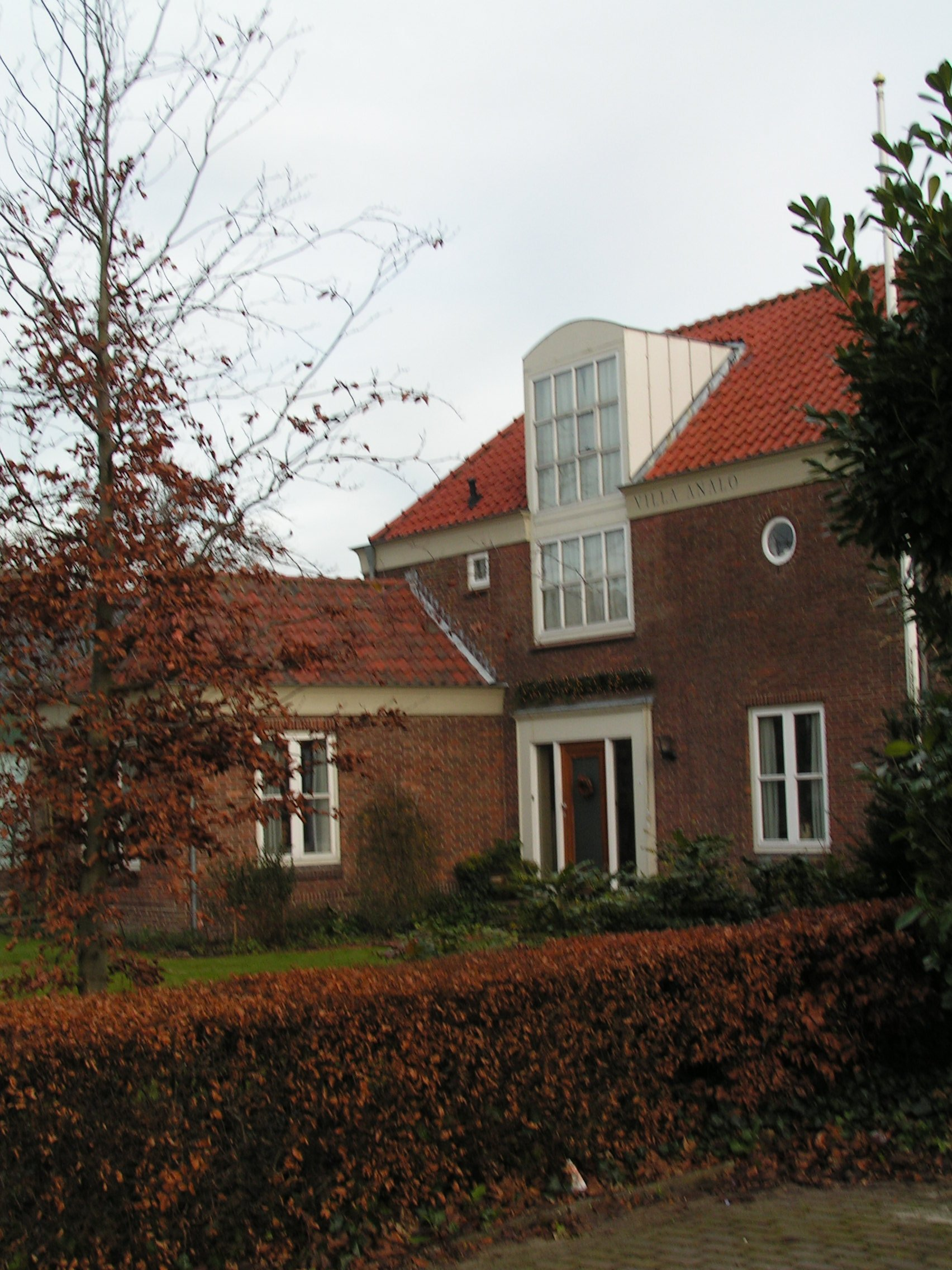 Villa Analo te Andel, eerste vermelding in 850 n.Chr.